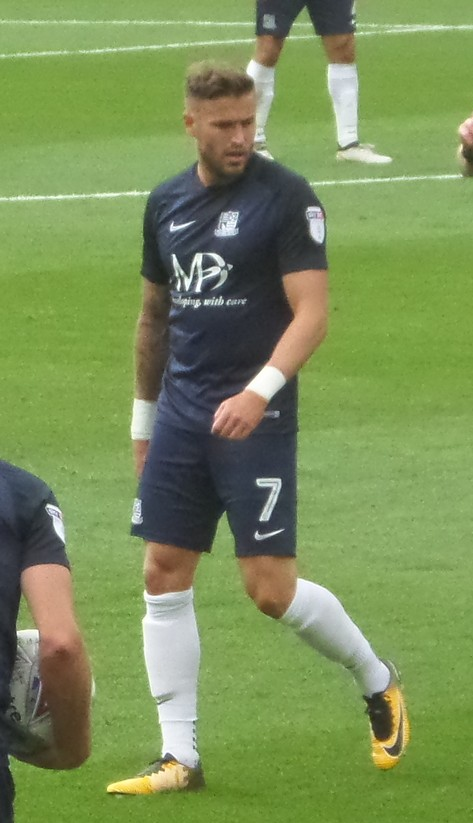 SAMSUNG CAMERA PICTURES